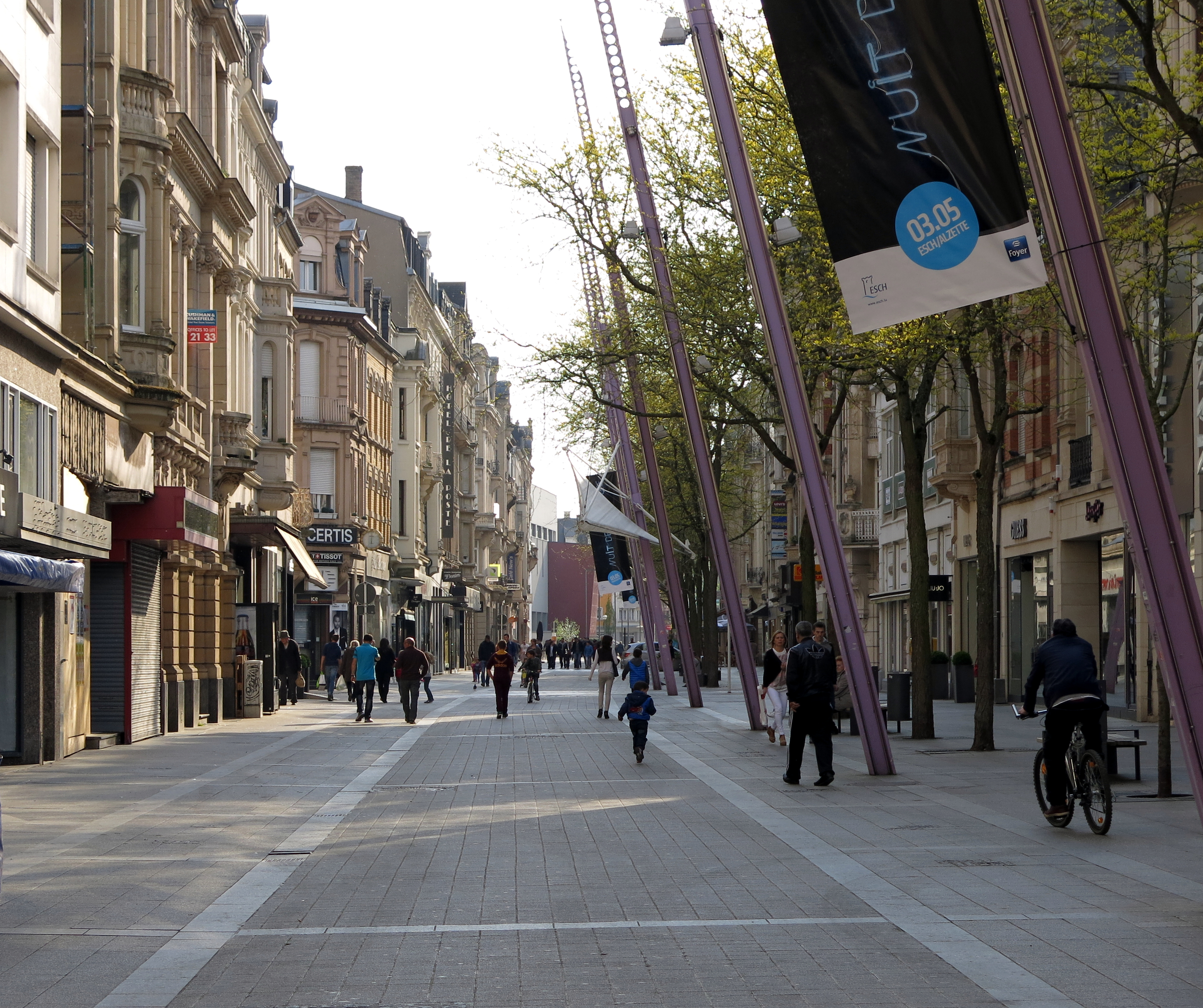 An der Uelzechtstrooss zu Esch.